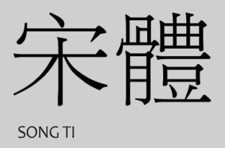 Police de caractère chinoise de type Song Ti